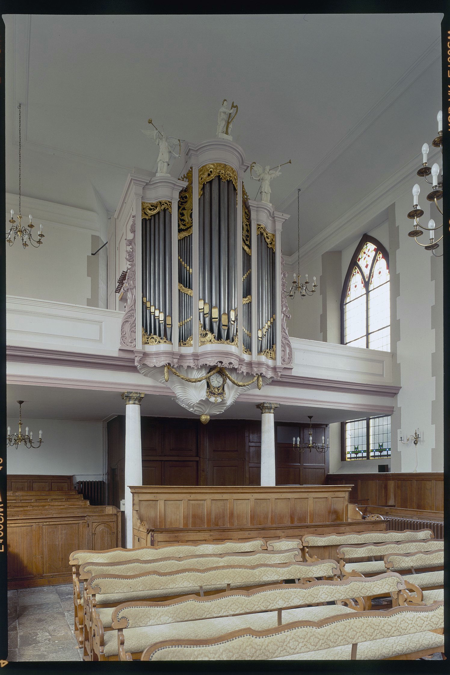 Lutherse kerk: Interieur, aanzicht orgel, orgelnummer 1629 (opmerking: Gefotografeerd voor Het Historische Orgel in Nederland 1769-1790)